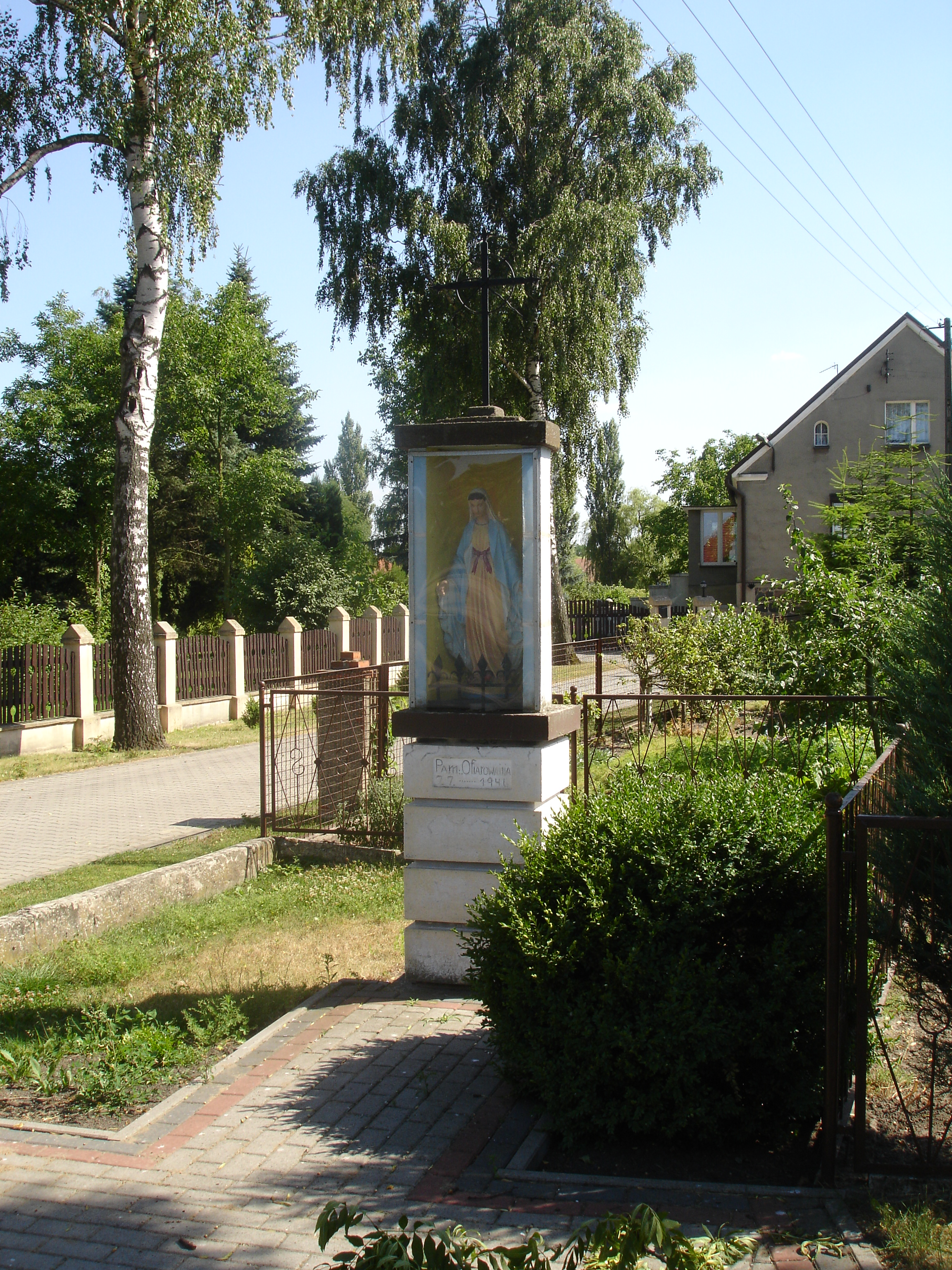 Kapliczka w Pawłowicach